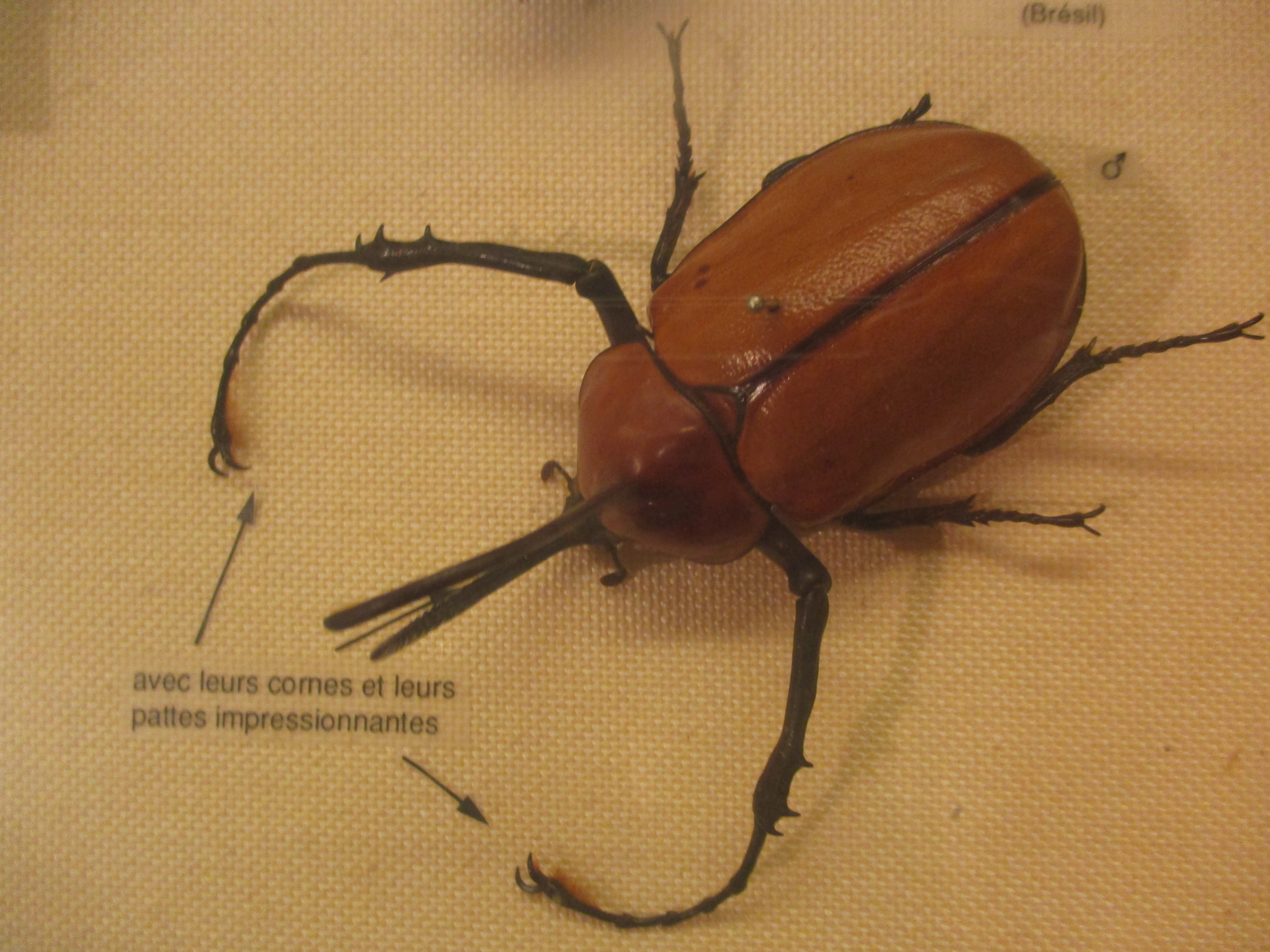 Spécimen de Golofa porteri Hope, 1837 (Brésil), musée zoologique de Strasbourg.